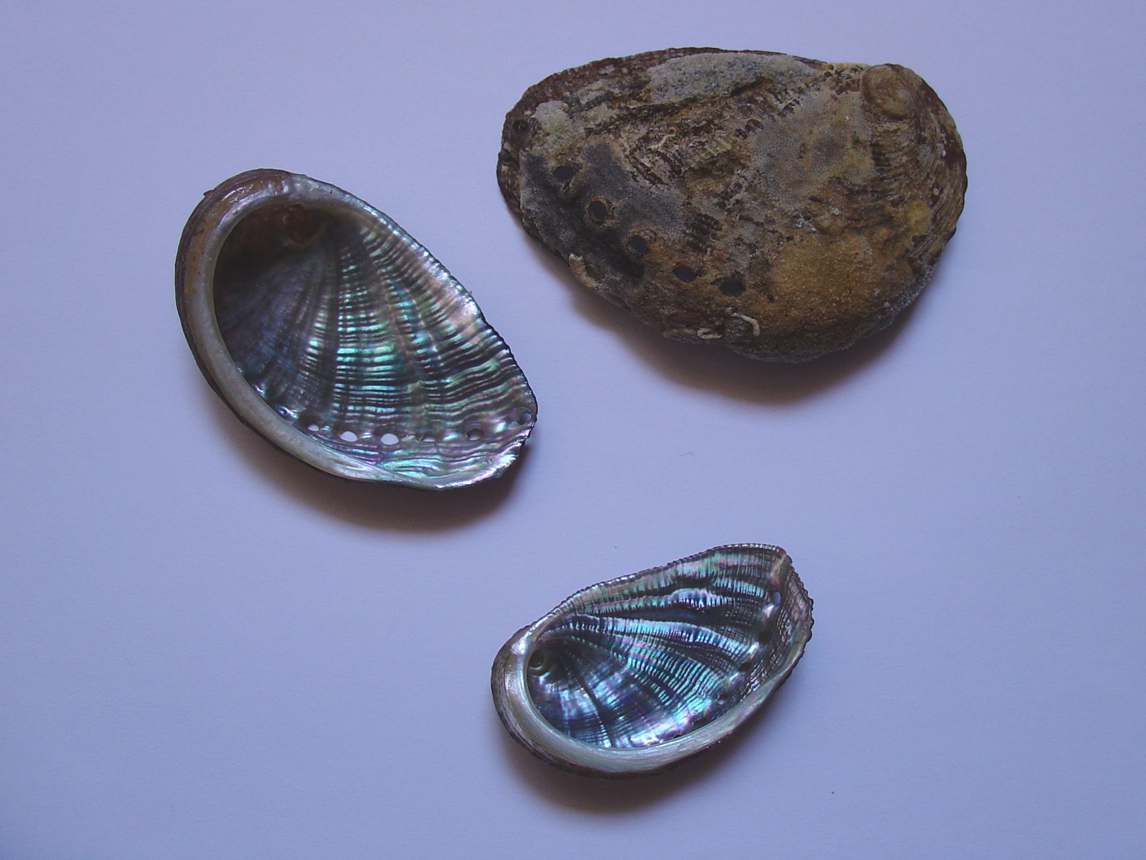 Haliotis lamellosa from El Portús, Cartagena, Murcia, Spain